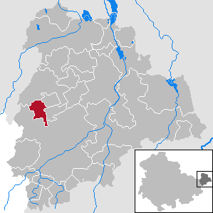 Dobitschen in Thuringia - District Altenburger Land